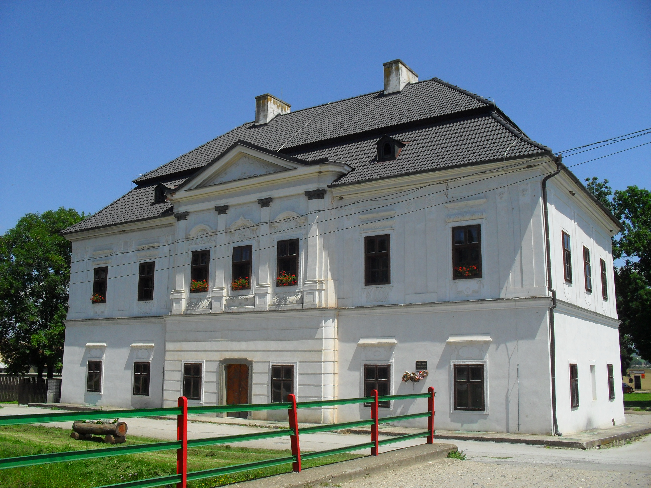 Sajógömör - egykori vármegyeházaSlovenčina: Neskorobarokový kaštieľ v obci Gemer (okr. Revúca)